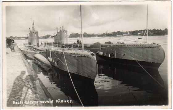 Estonian submarines Kalev and Lembit